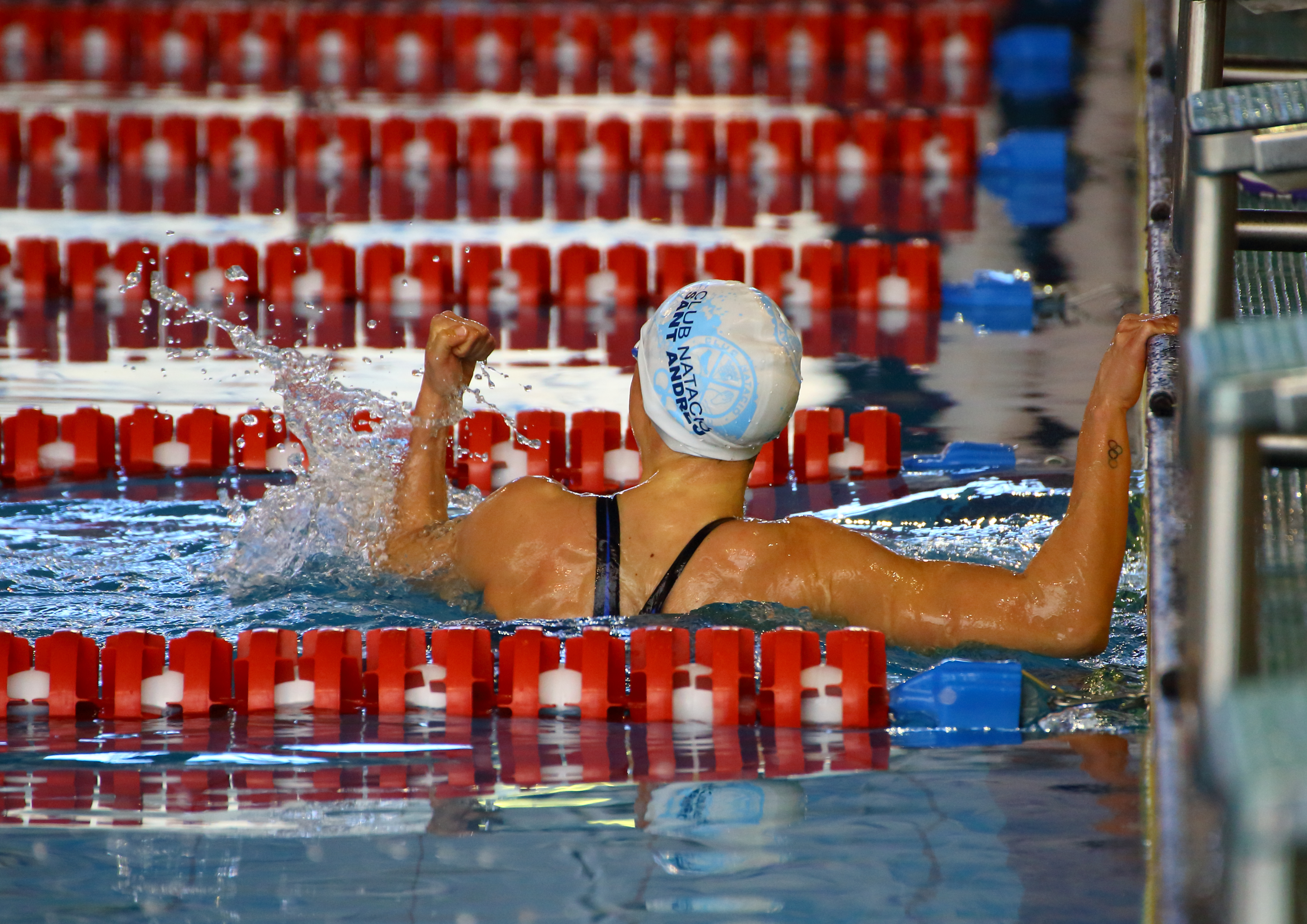 Momento del récord nacional, en la segunda sesión de la primera jornada